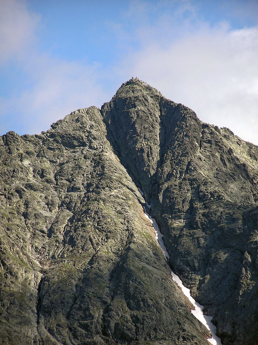 Wierzchołek Rysów widziany z ceprostrady na Szpiglasową Przełęcz. Oświetloną grzędą w centrum zdjęcia, na lewo od linii śniegów, wiedzie końcowy odcinek szlaku na Rysy wyprowadzający na grań na lewo od szczytu. Na wierzchołku widoczne zarysy ludzkich postaci.